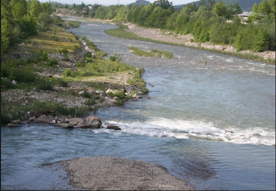 Mudurnu Çayı